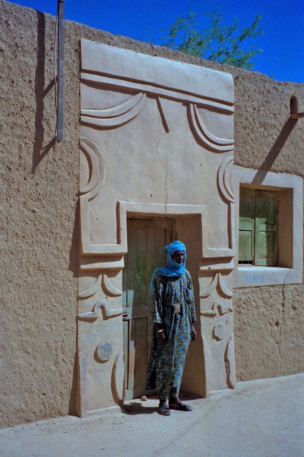 Agadez building.